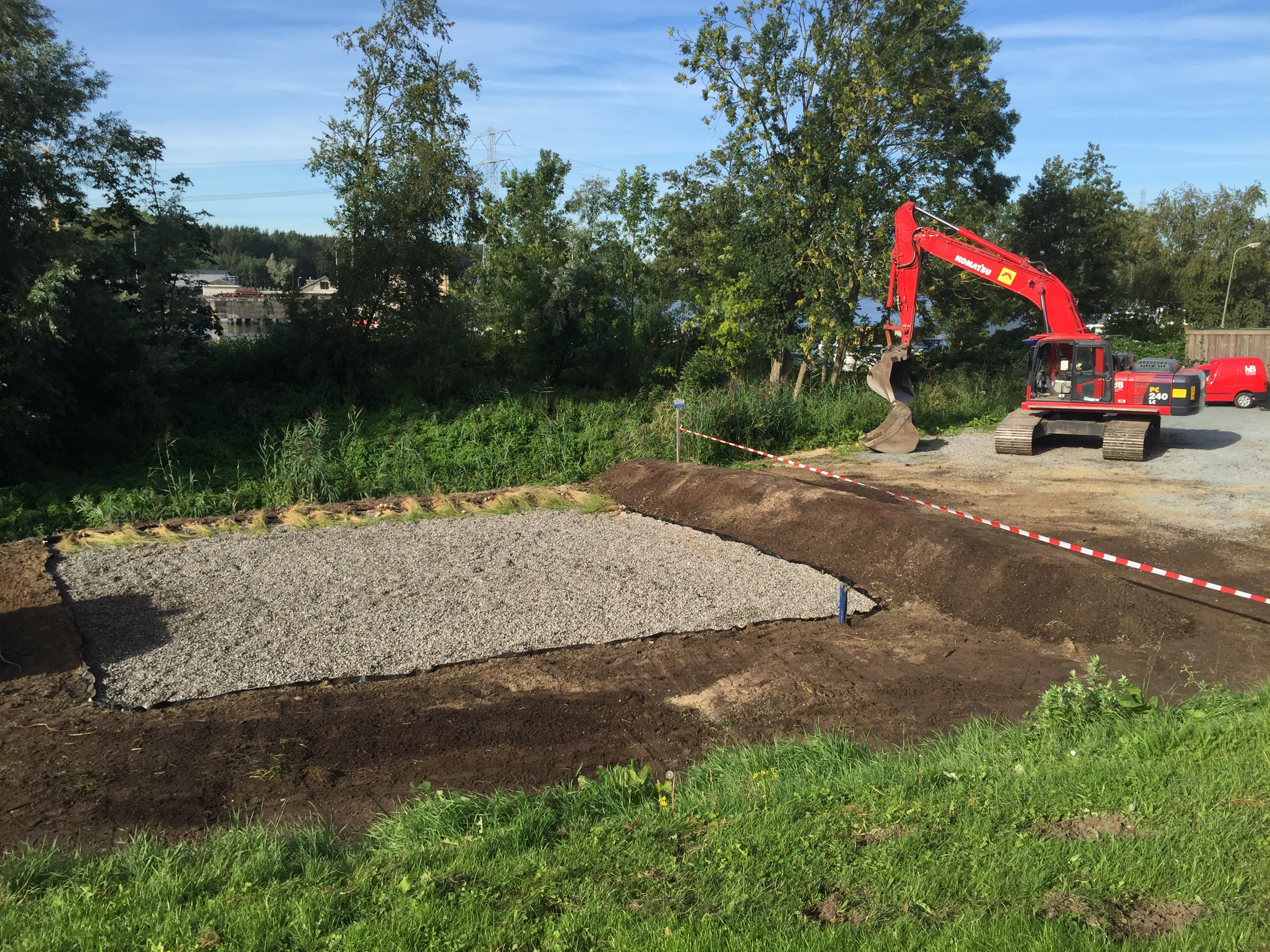 Helofytenfilter tijdens constructie nabij Paviljoen te Diemen